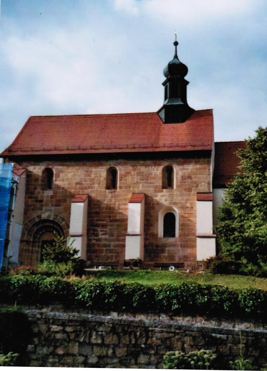 Filialkirche Heilige Drei Koenige und Matthaeus Friedersried